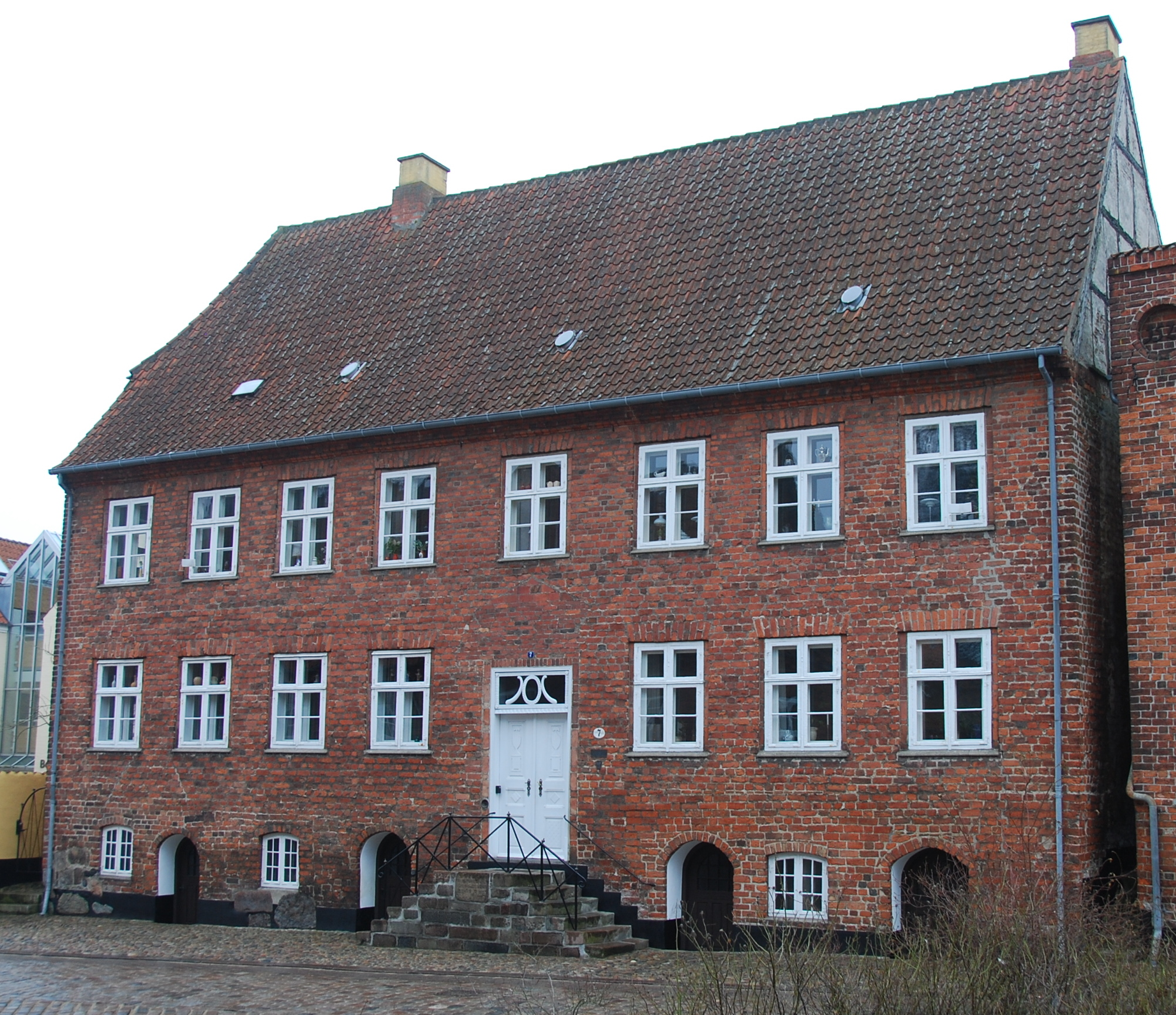 Den fredede bygning "Den Hauchske Gård" i Viborg.